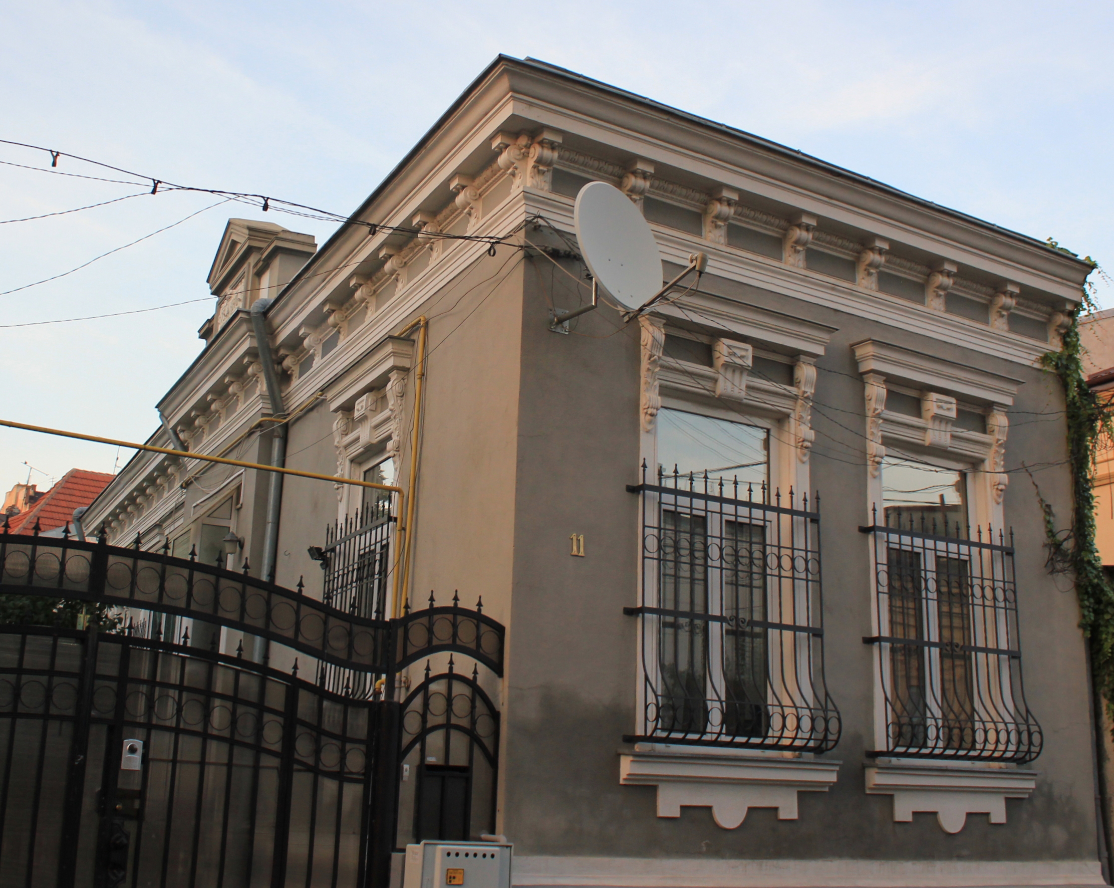 Casă Georgescu Mihail 11